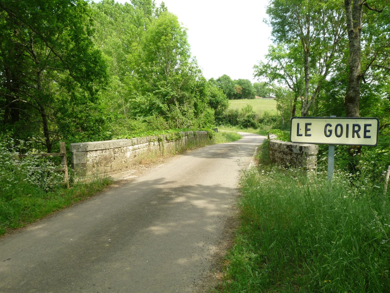 le Goire à Lésignac, St-Maurice-des-Lions, Charente, France